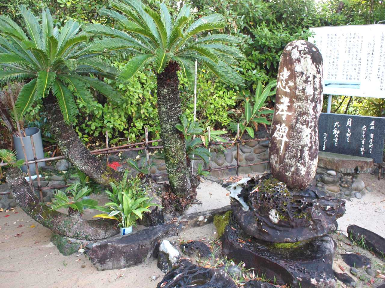 鹿児島県西之表市にある若狭の墓。右は若狭忠孝碑